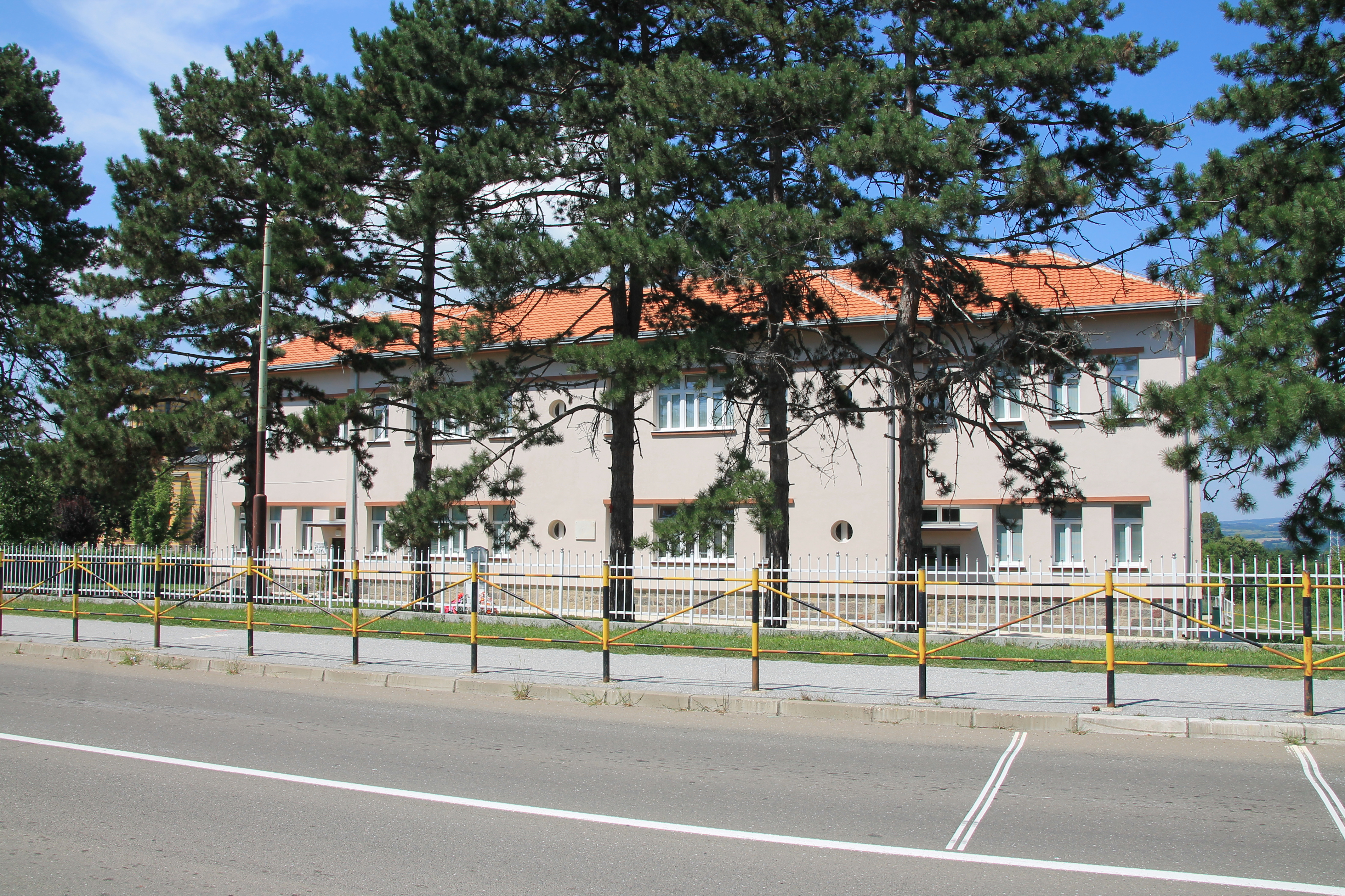 OŠ Vuk Karadžić Knić